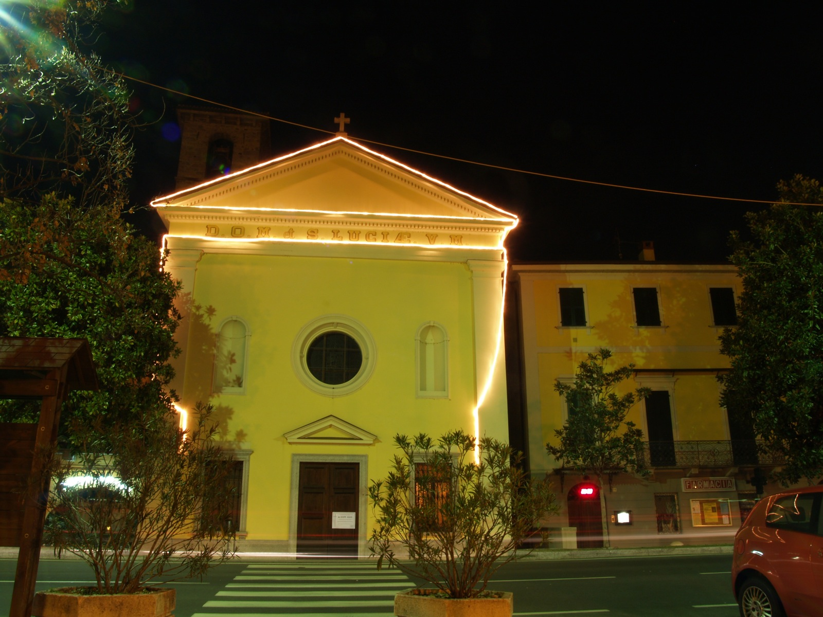 Situata sul lungolago di Suna, risale al XVI secolo. Conserva all'interno 8 tondi dipinti in olio su tela realizzati da Mario Tozzi e situati sulla volta. I quattro tondi, realizzati tra il 1923e il 1924, sono dedicati a Santa Lucia da Siracusa e ad episodi della sua vita, a Sant'Andrea da Avellino, a San Francesco d'Assisi ed a San Mauro. Santa Lucia è la patrona di Suna e protettrice degli scalpellini.